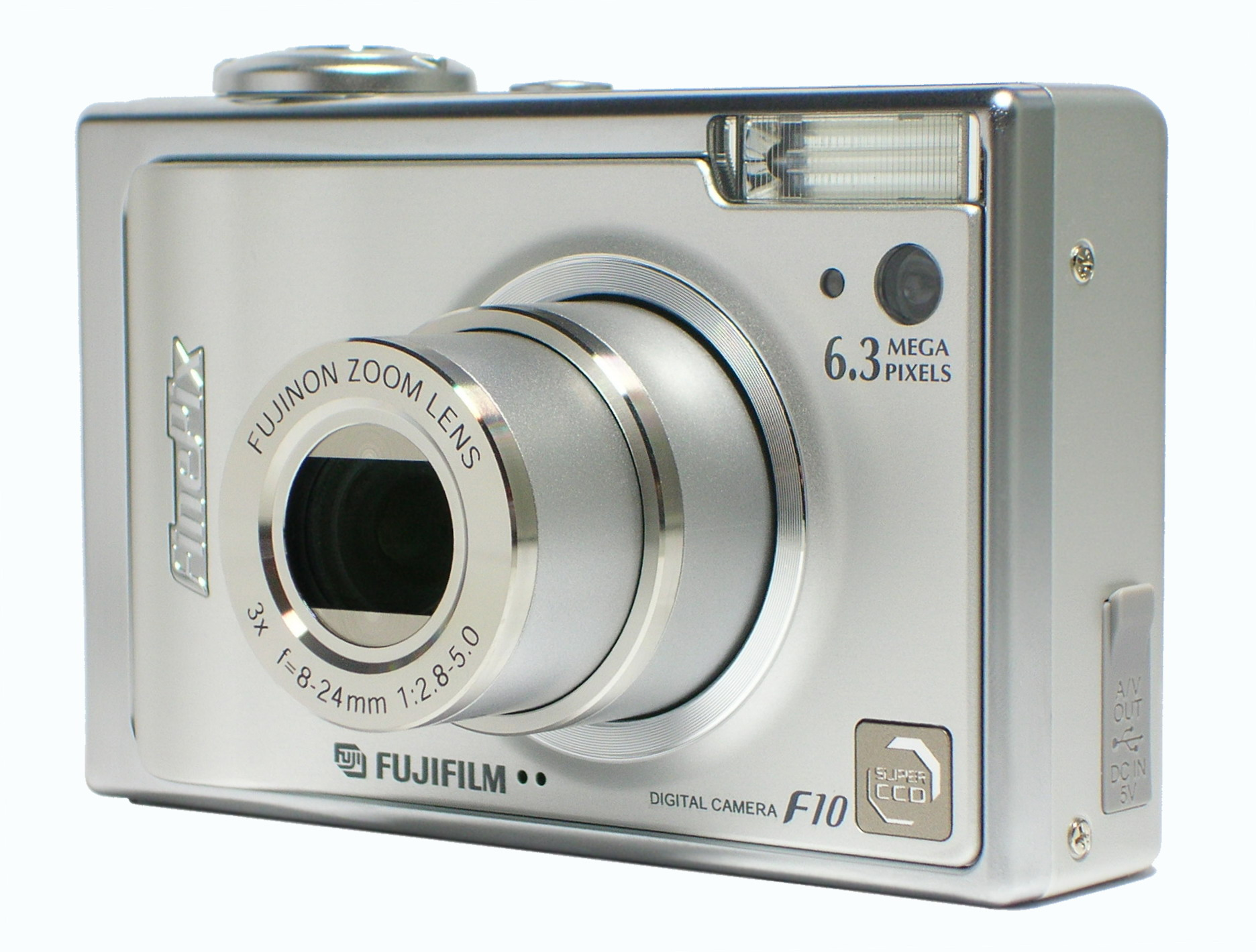 Fujifilm FinePix F10 Digital camera (2005)